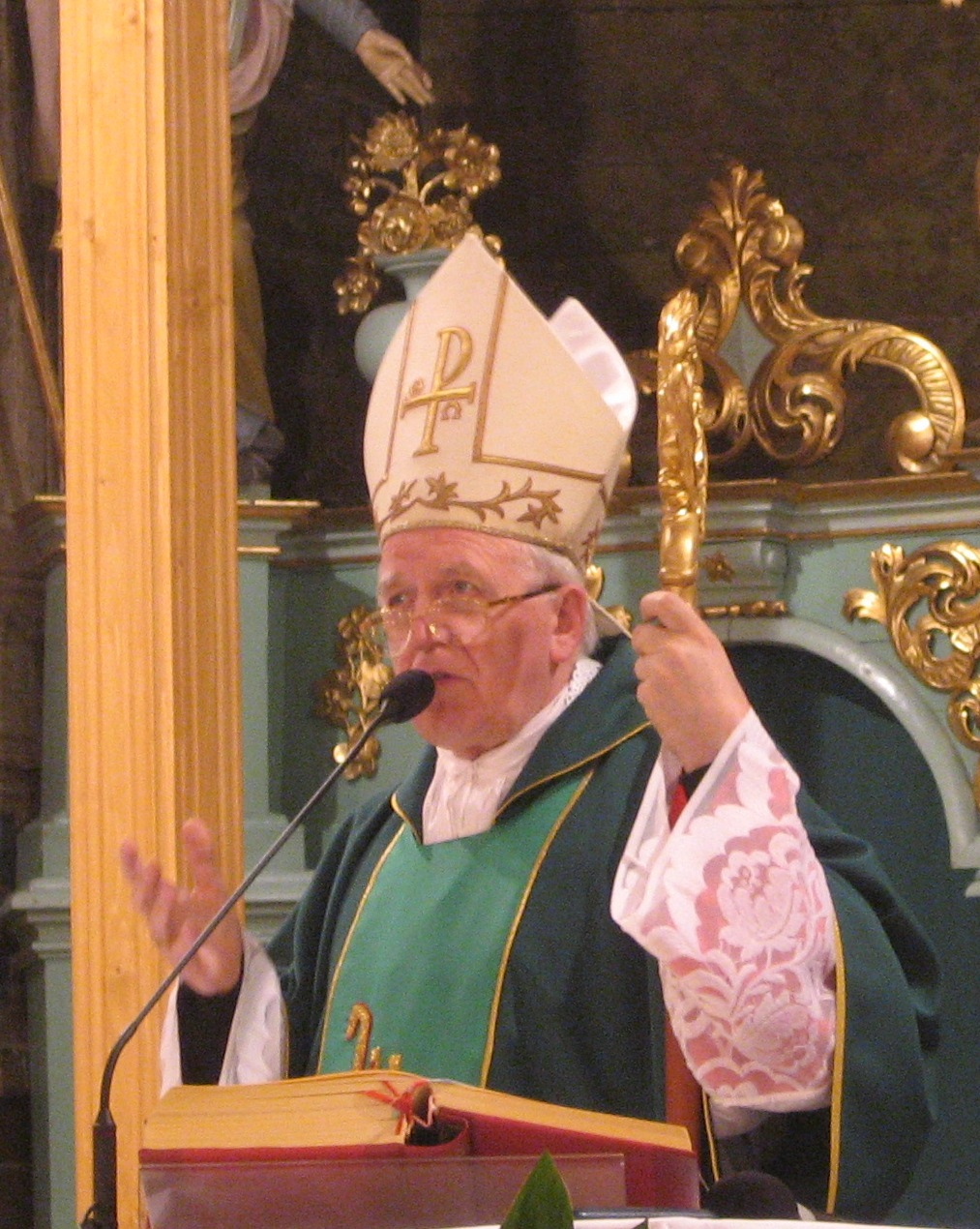 Arcybiskup Stanisław Nowak